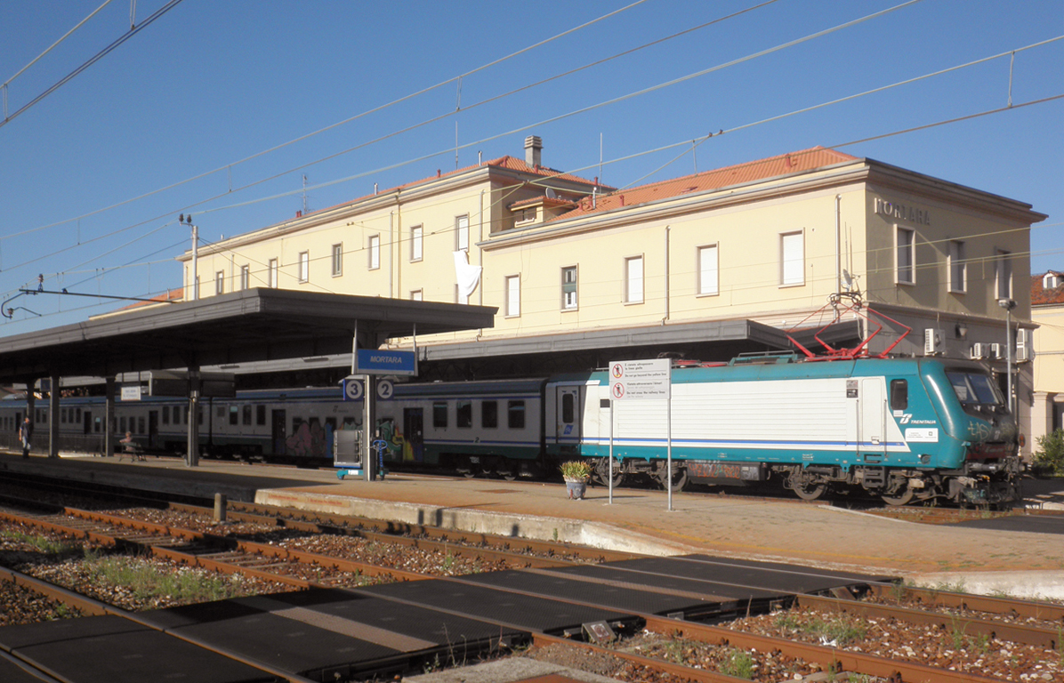 Stazione ferroviaria di Mortara.